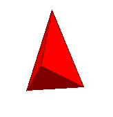 Representação exata da Pirâmide de base Triangular